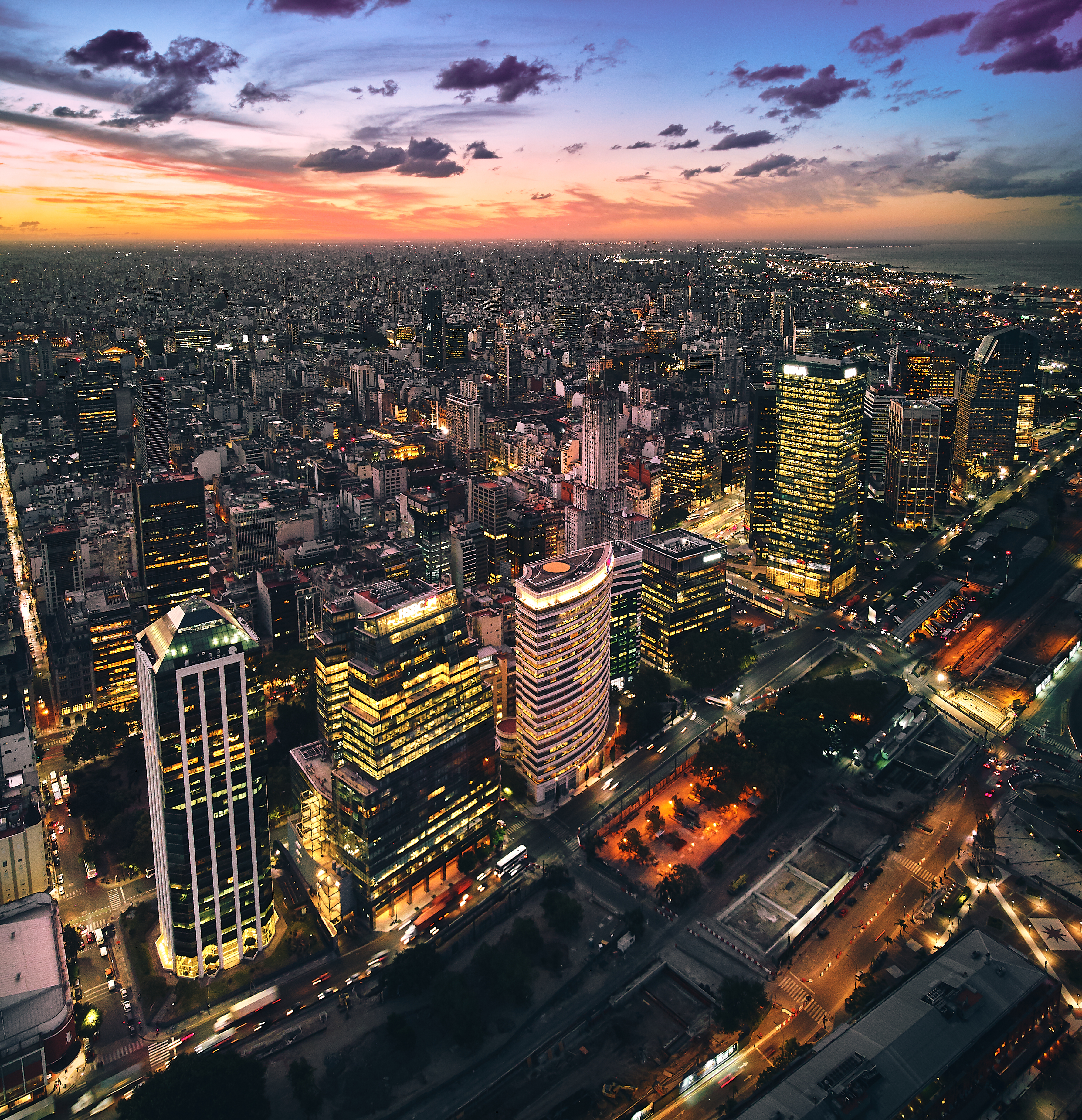 Microcentro, Buenos Aires